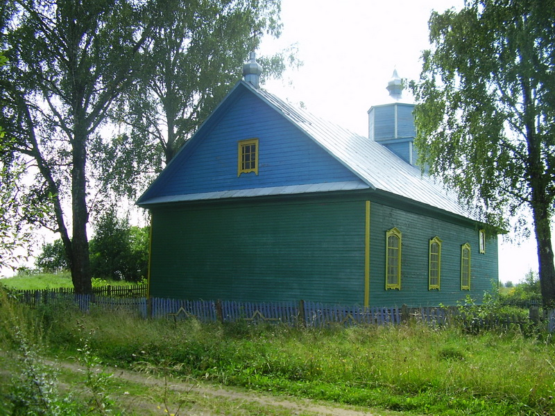 Ніўнікі. Свята-Успенская царква This is a photo of Belarusian heritage monument. Reference number: 213Г000565 ( WLM)